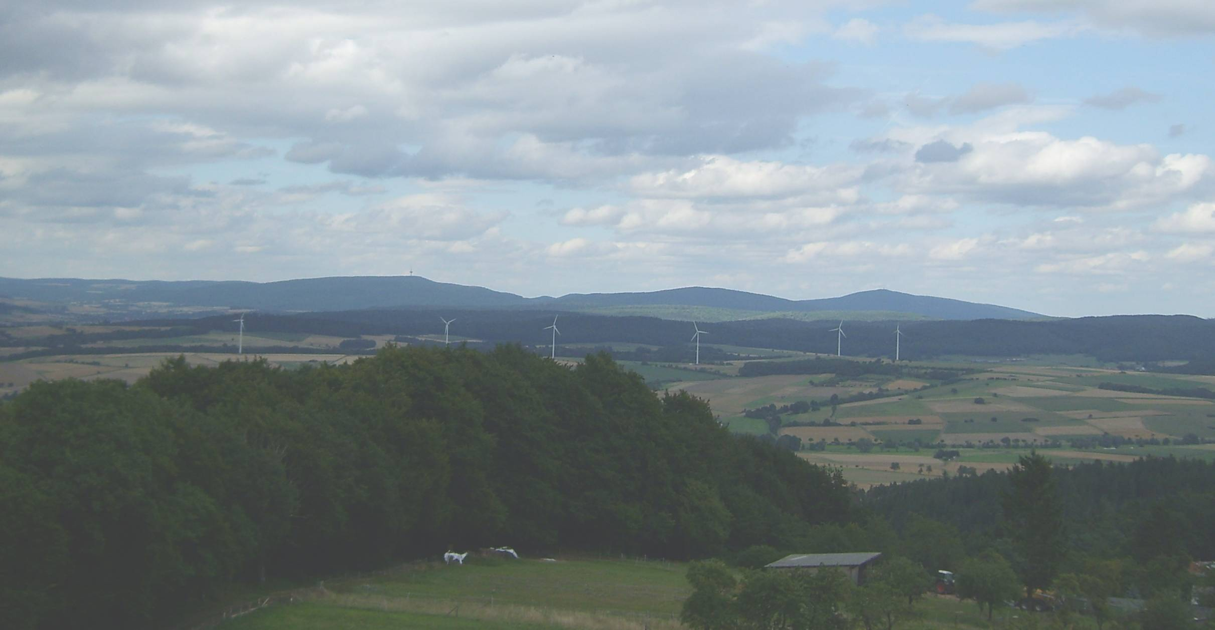 Der Kellerwald mit Hohem Lohr (657m, links), Jeust (585m, Mitte) und Wüstegarten (675m, rechts) vom 380m hohen Burgholz, der, wie auch alle Erhebungen im Vordergrund, zu den Gilserberger Höhen gehört, aus gesehen